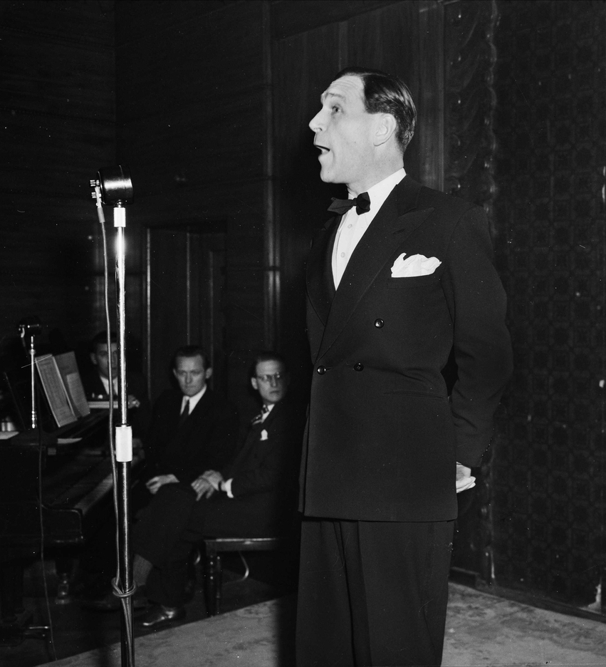 Arne Bang-Hansen (født 8. september 1911, død 23. februar 1990) var en norsk skuespiller som var ansatt en årrekke ved Nationalteatret.